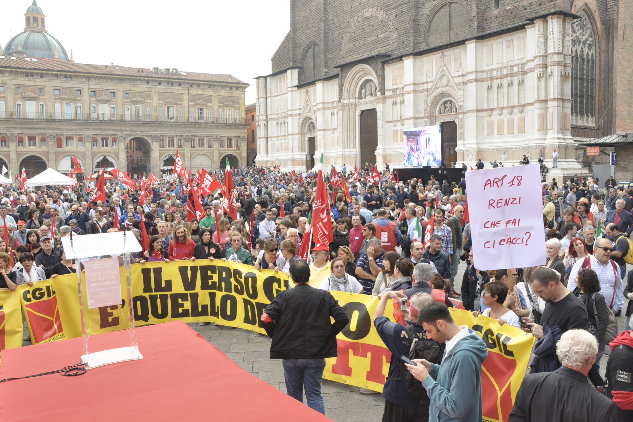 Foto di Gastone Ecchia